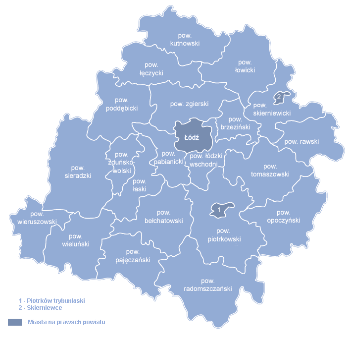 Podział administracyjny województwa łódzkiego na powiaty i miasta na prawach powiatu